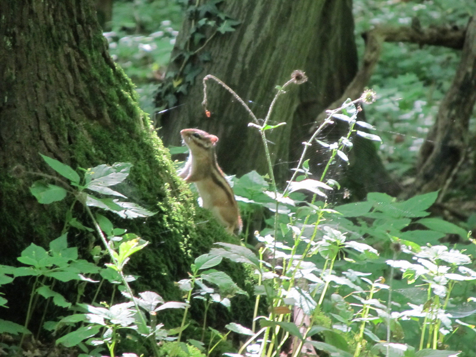 2012-08-15 in Zonienwoud